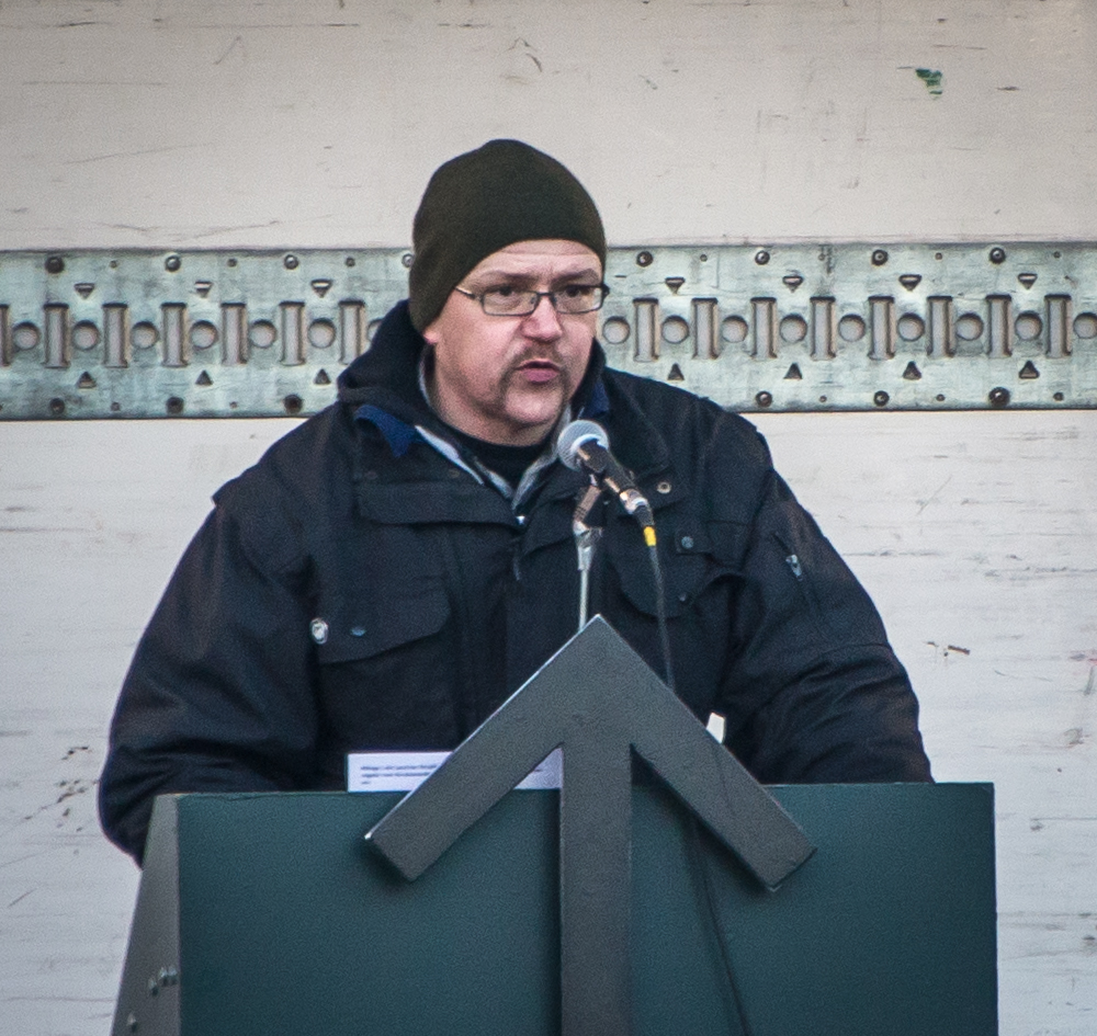 Nordiska motståndsrörelsens Pär Öberg i talarstolen på Mynttorget nedanför Stockholms slott den 12 november 2016 i samband med en demonstration för NMR.